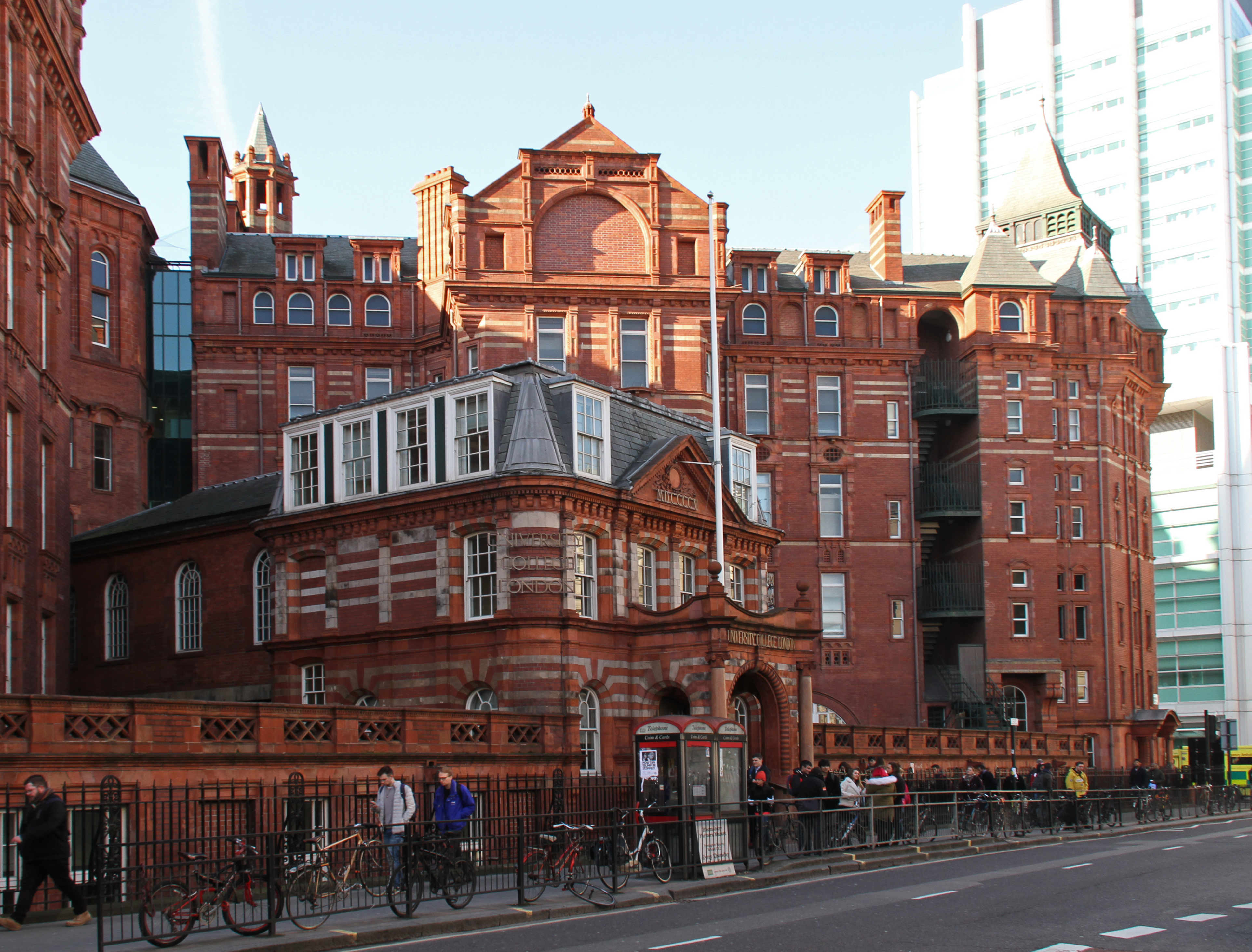 UCL 4